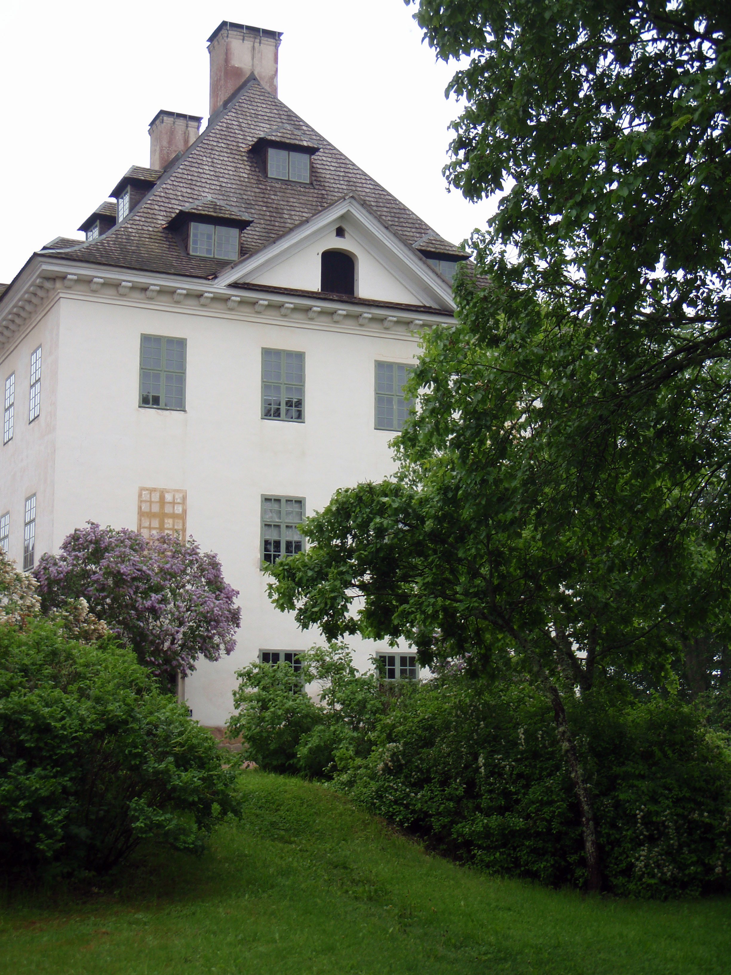 Louhisaaren kartanolinna Askaisissa.